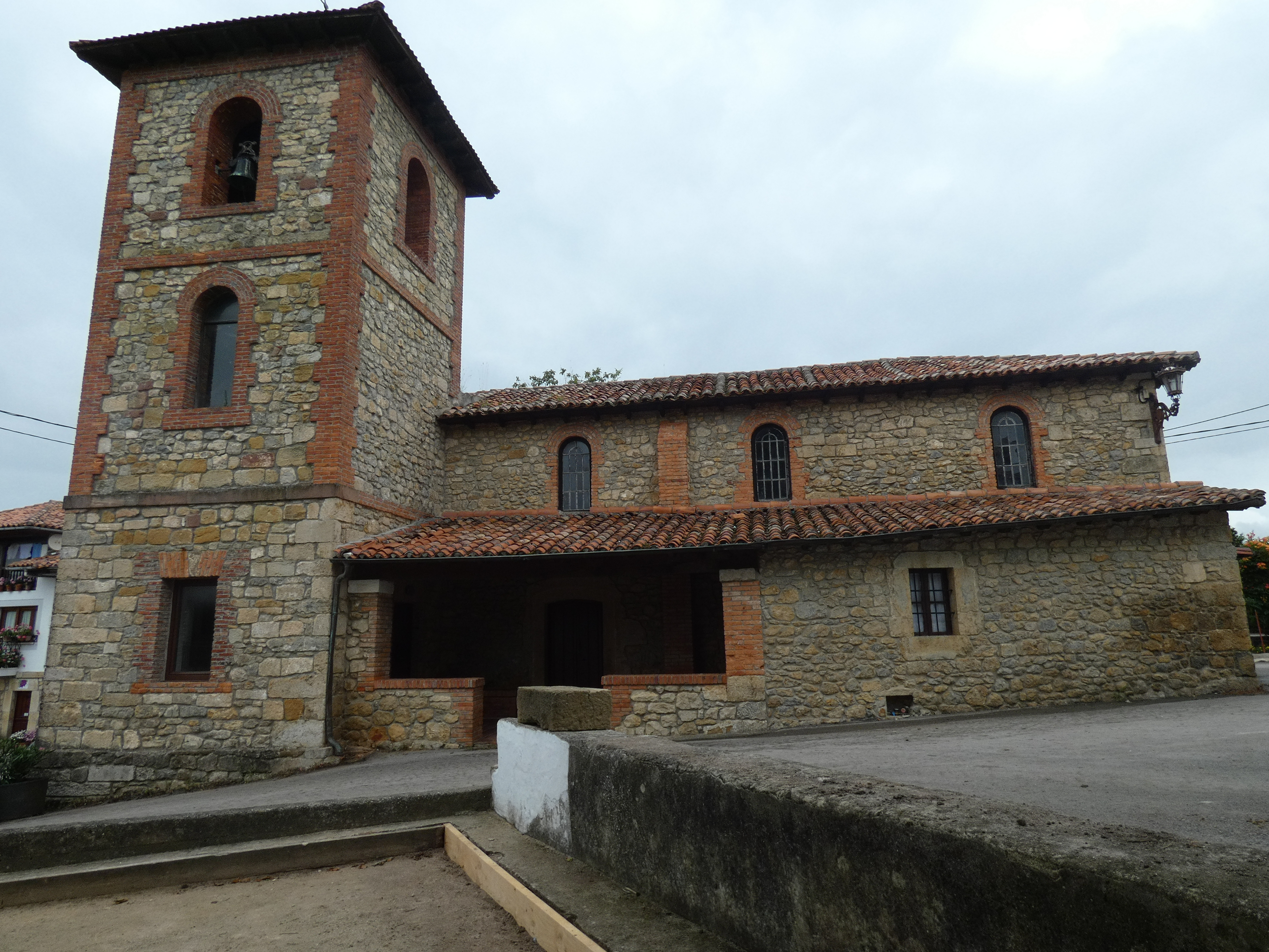 Luey (Cantabria)